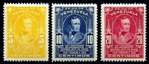 Estampillas venezolana del 150 aniversario de nacimiento del Gran Marisca de Ayacucho 1945